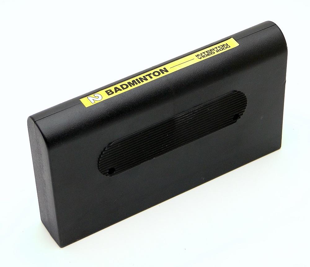 Interton Video 2000 Cartridge Badminton